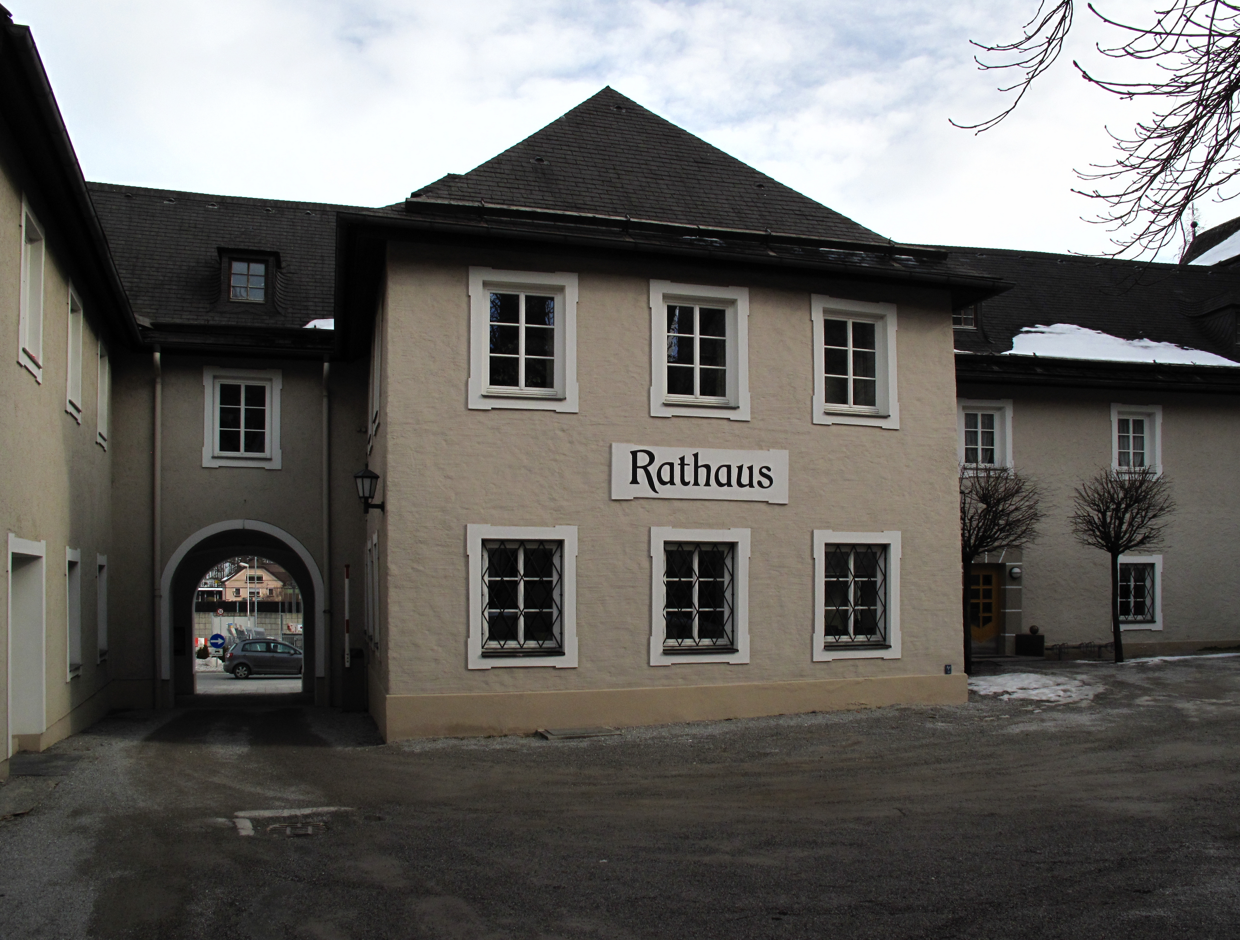 Rathaus, 5500 Bischofshofen, Rathausplatz 1